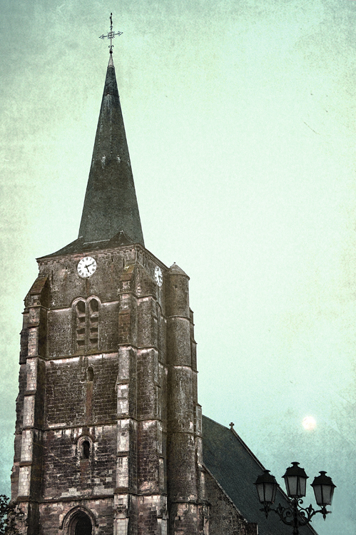 Eglise de Rieux-en-Cambrésis [59277] - Nord/France